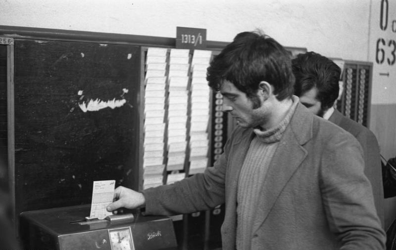 VW-Werk, Wolfsburg Ende der Frühschicht - Werksangehörige beim Abstempeln der Zeitkarte